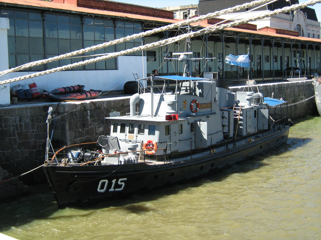 ARA Cormorán, Buenos Aires, 2009.